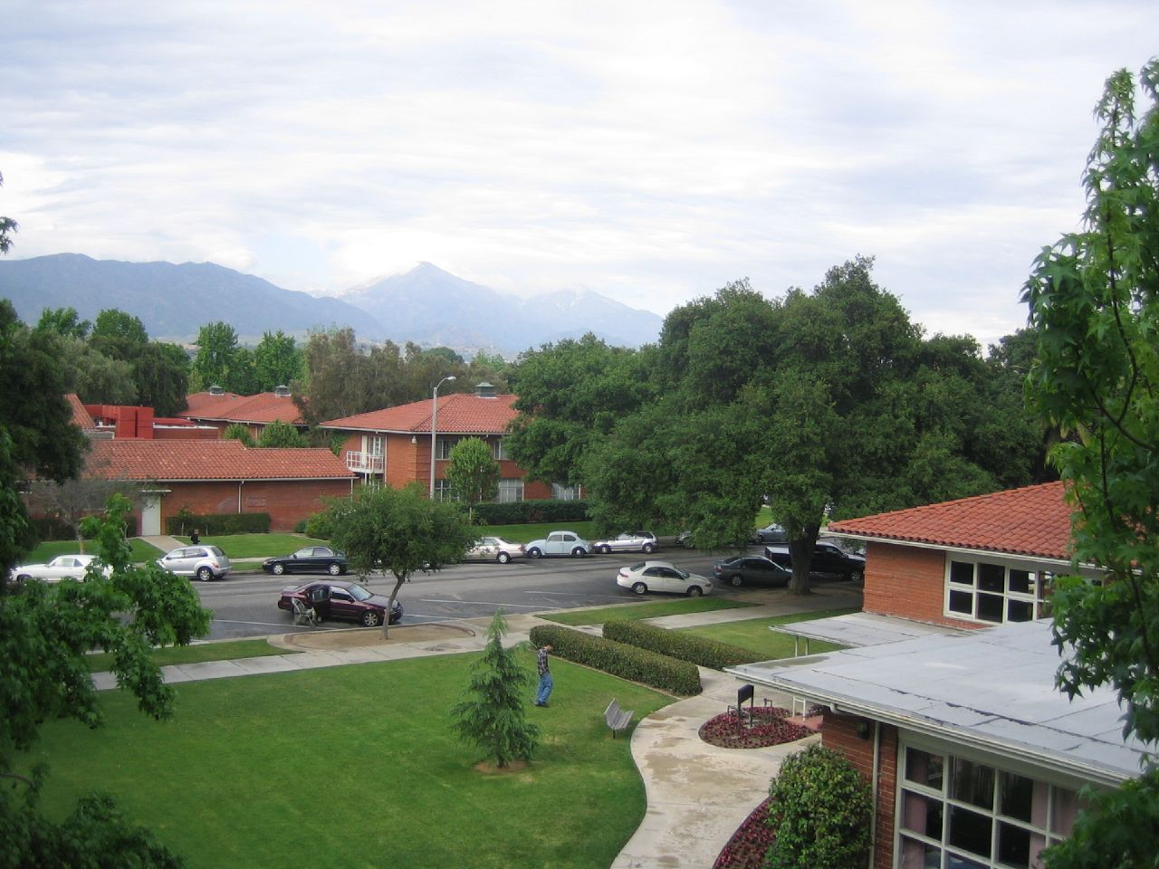 3rd Street